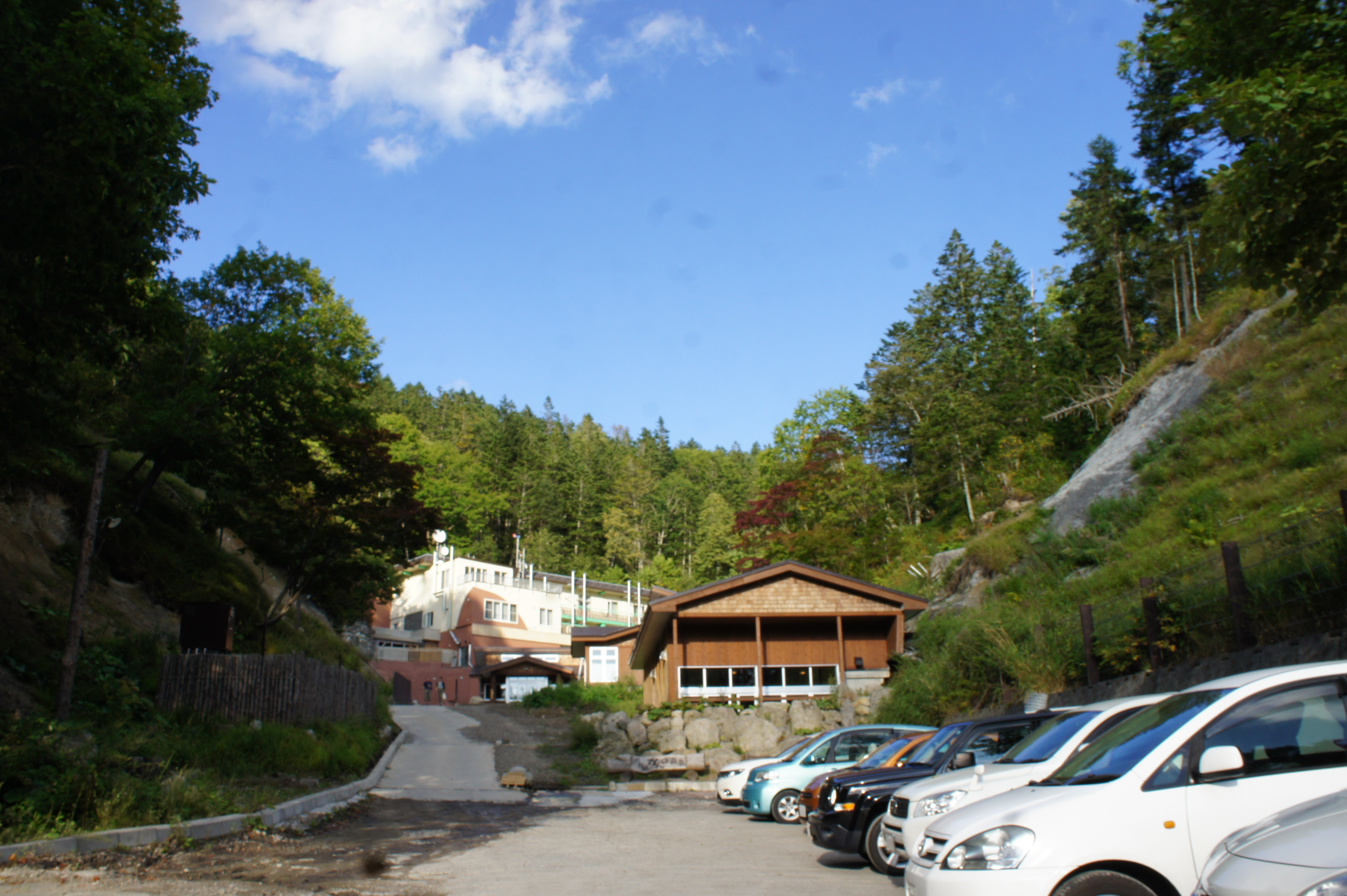 かんの温泉全景